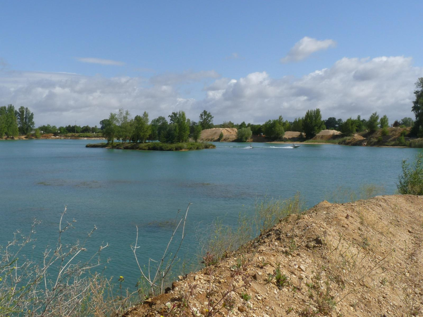 Ancienne sablière et club de ski nautique, St-Même-les-Carrières, Charente, France